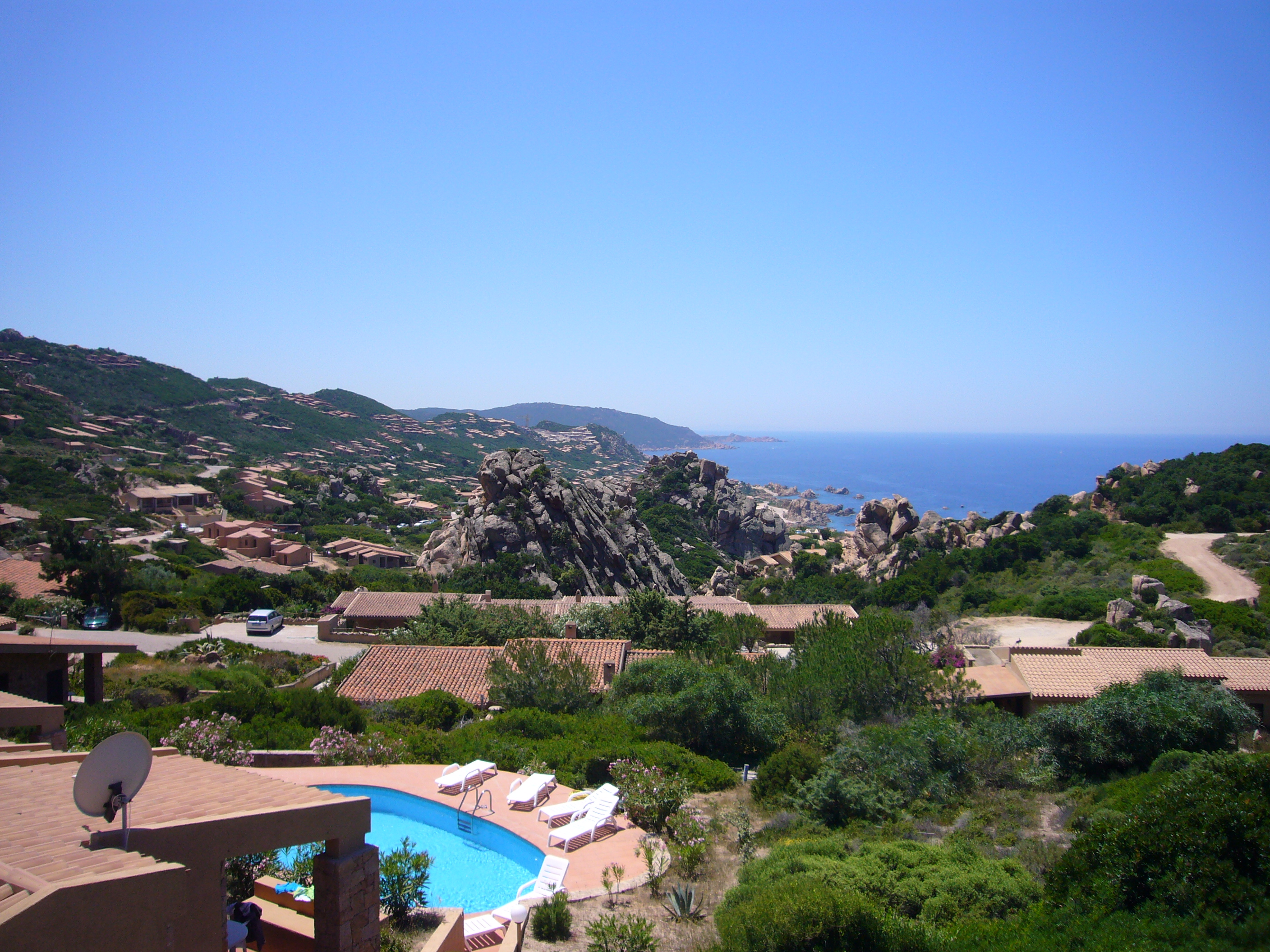 Costa Paradiso, Trinità d'Agultu e Vignola , Sardinien